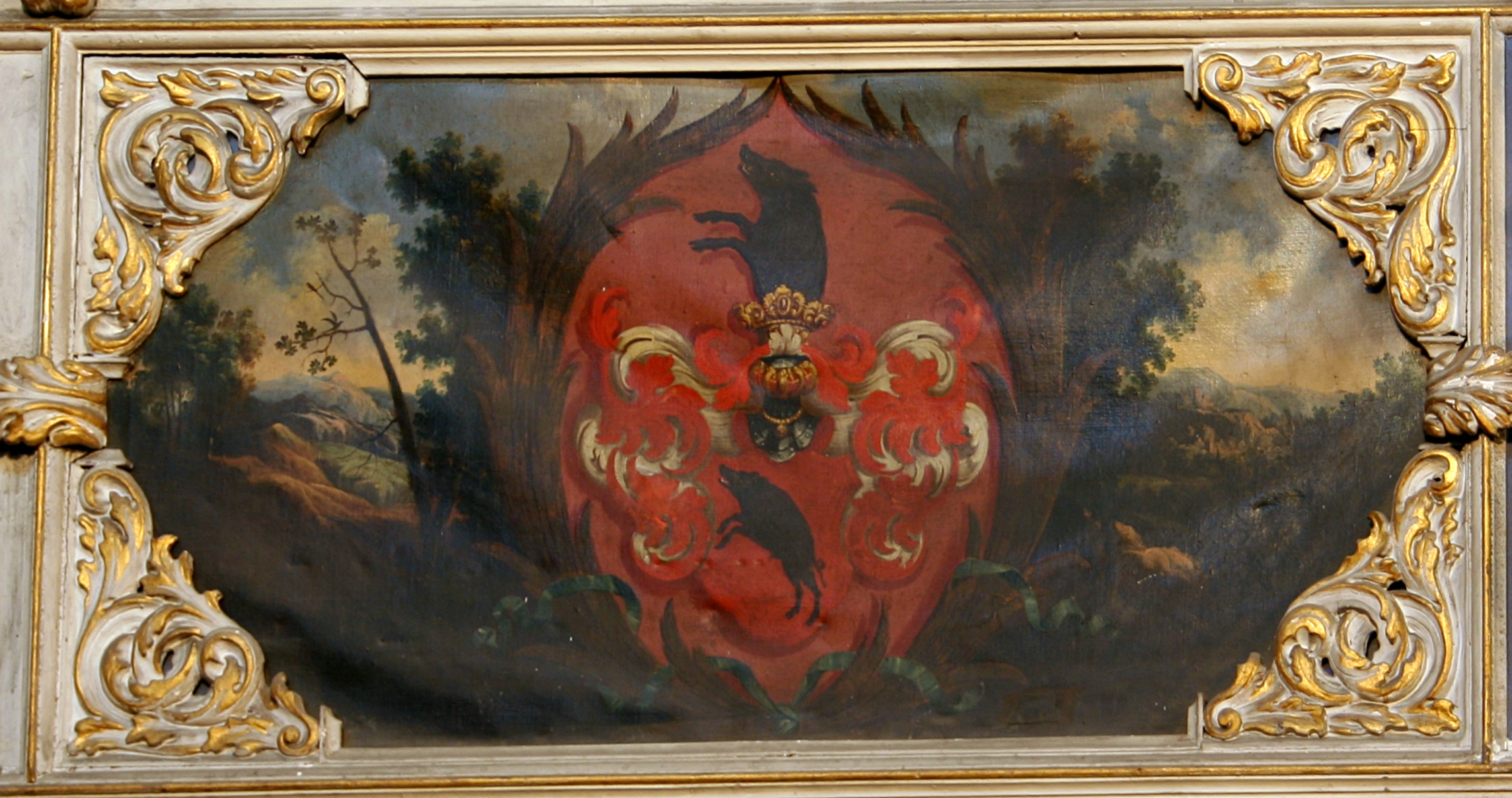 Obraz herbowy Śwników w Kościele Pokoju w Jaworze (zabytek nr A/1905/990 z 4.09.1963)